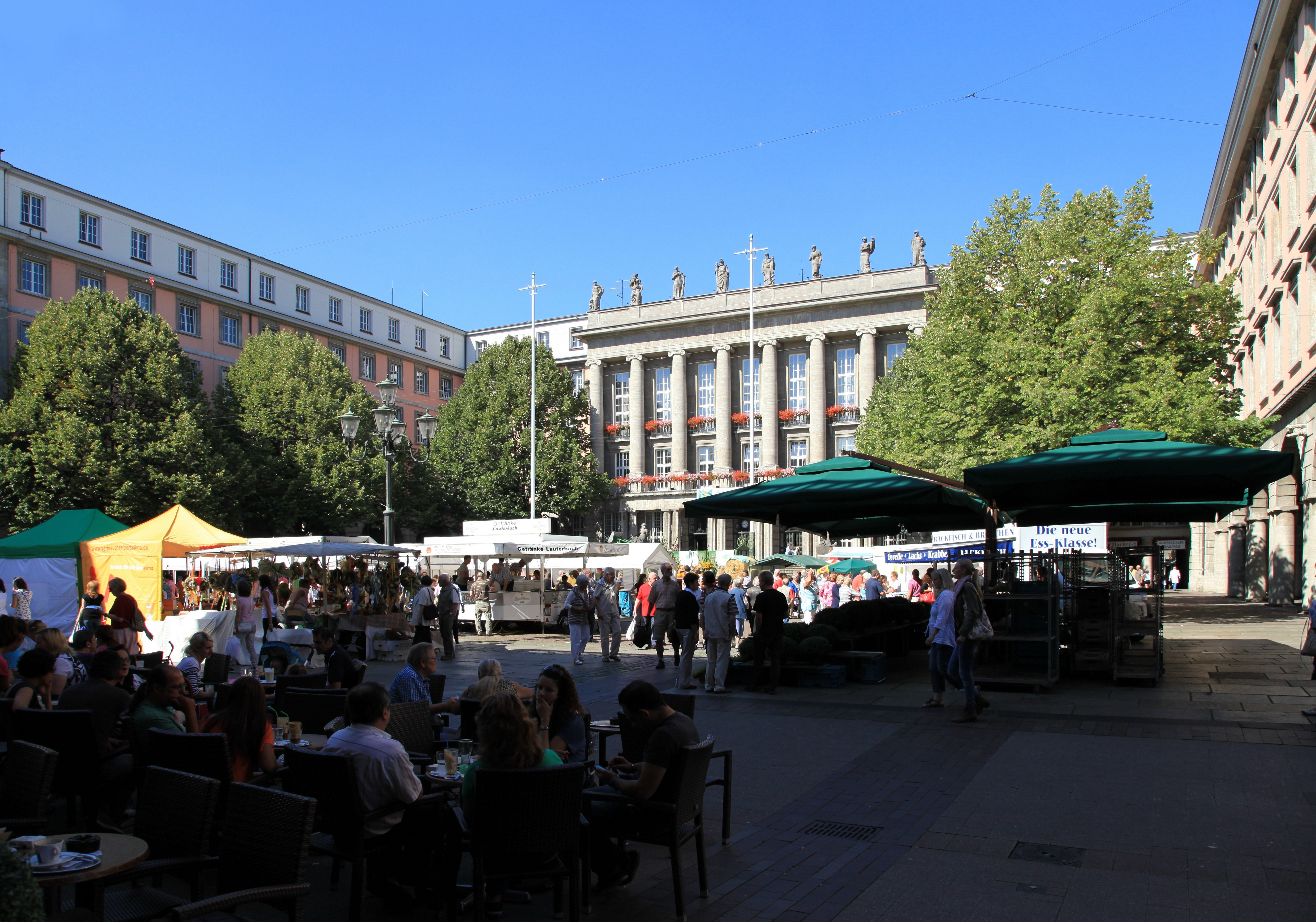 Wuppertaler Bauernmarkt 2012 auf dem Johannes-Rau-Platz in WuppertalThis is a photograph of an architectural monument. 1707